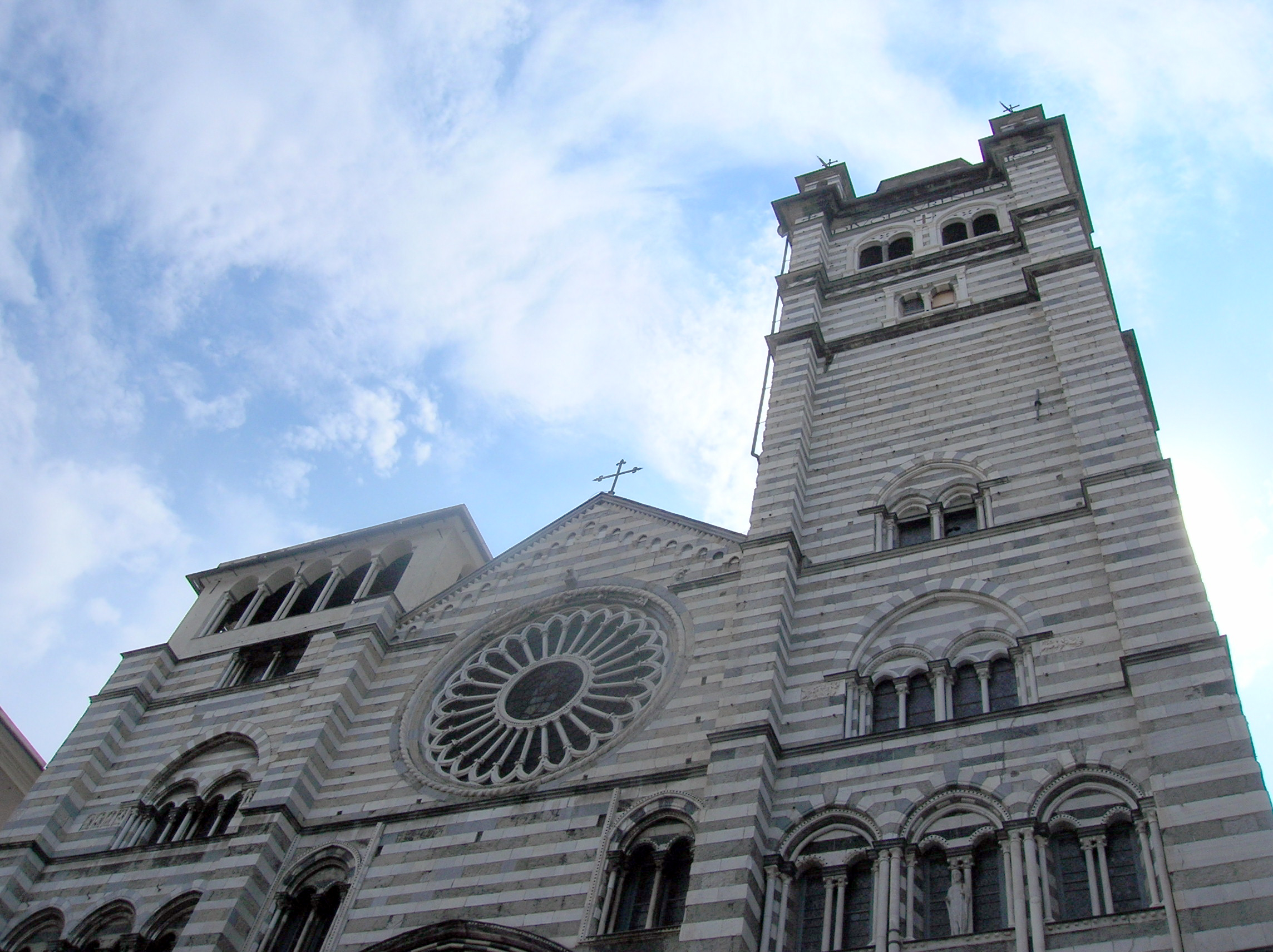 Genueser Dom (selbst fotografiert)